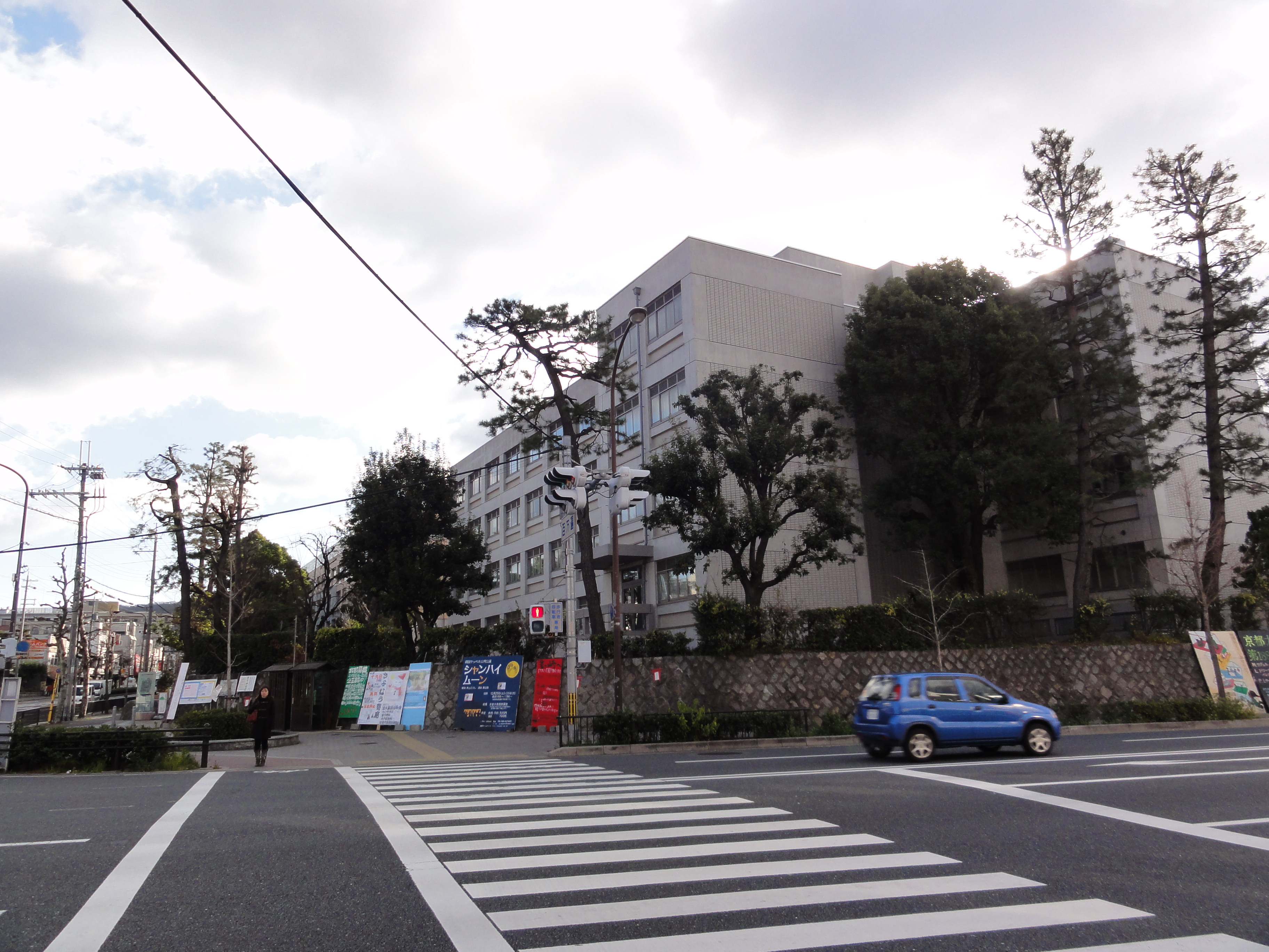 Hyakumanben,Kyoto 百万遍